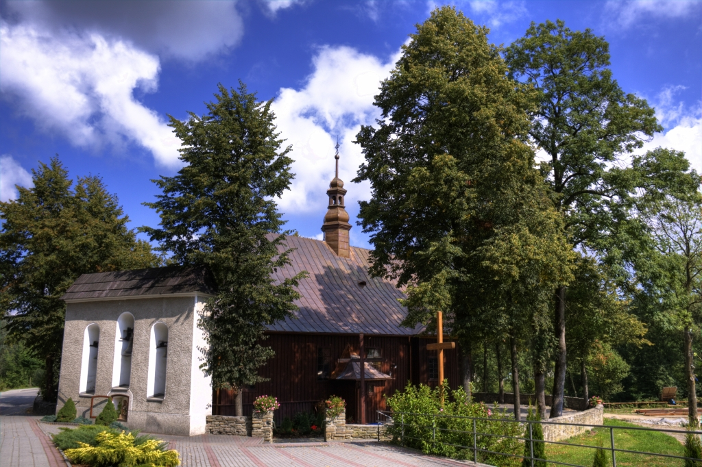 Słopnice - rzymskokatolicki kościół parafialny p.w. św. Andrzeja Apostoła, 1774-1776